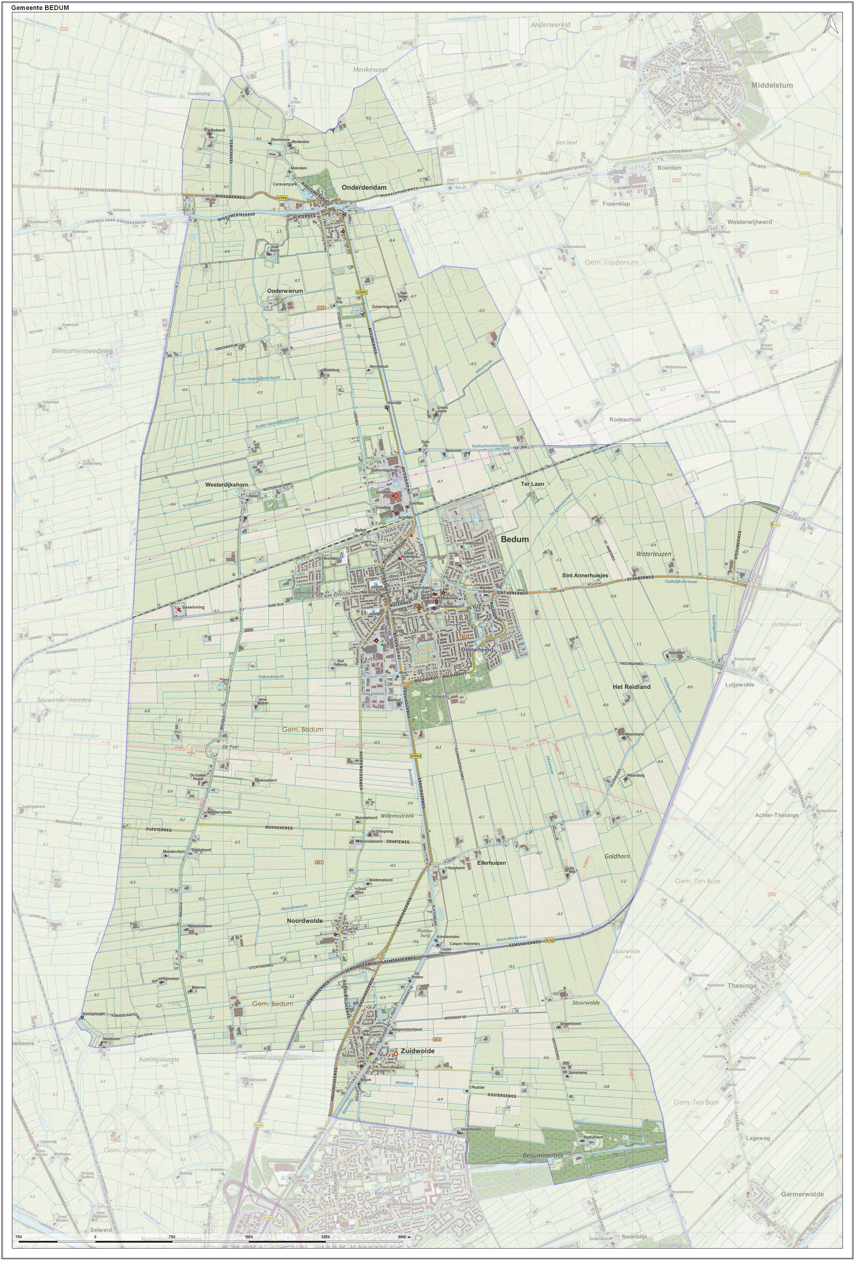 Topografische gemeentekaart. Resolutie: 400 pixels/km. Kaartbeeld samengesteld uit de open geodata van de Top10NL en Top25namen (Kadaster), Creative Commons-BY licentie. Gebouwvlakken uit open geodata BAG extract. Wegen uit de OpenStreetMap, OpenStreetMap community. Reliëfschaduw uit de Actuele Hoogtekaart AHN2. Samenstelling en kleurenschema: Jan-Willem van Aalst, met QGIS. Zie ook de Legenda.